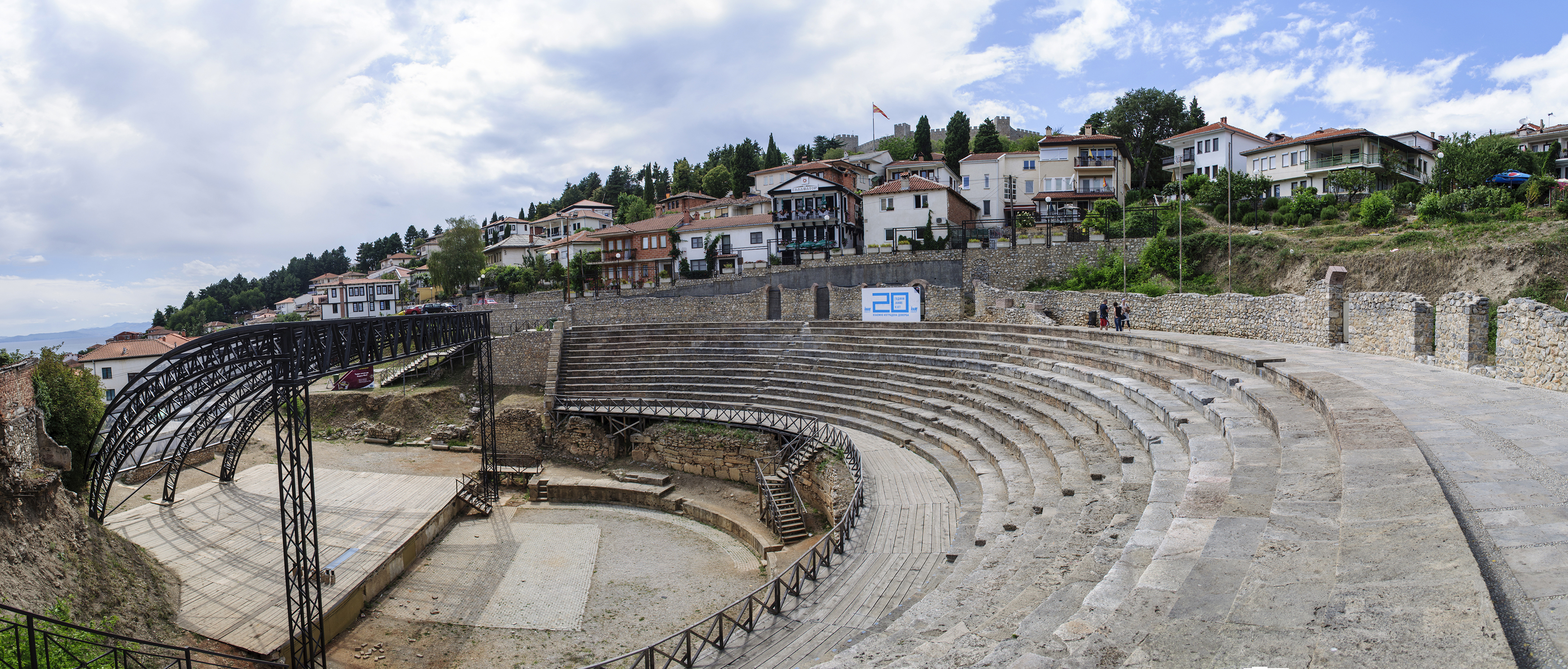 Сместен во стариот дел од Охрид театарот функционирал во хеленистичкиот и во римскиот период. Вкопан во падината од еден рид, максимално разградуван во доцноантичкото време, од некогашните 30 реда на мермерни седишта, оригинално се зачувани само 7-8 реда. Денеска театарот е комплетно реновиран, претставувајќи своевидна археолошка атракција и место каде се одвиваат настани од културниот живот на Охрид и Македонија